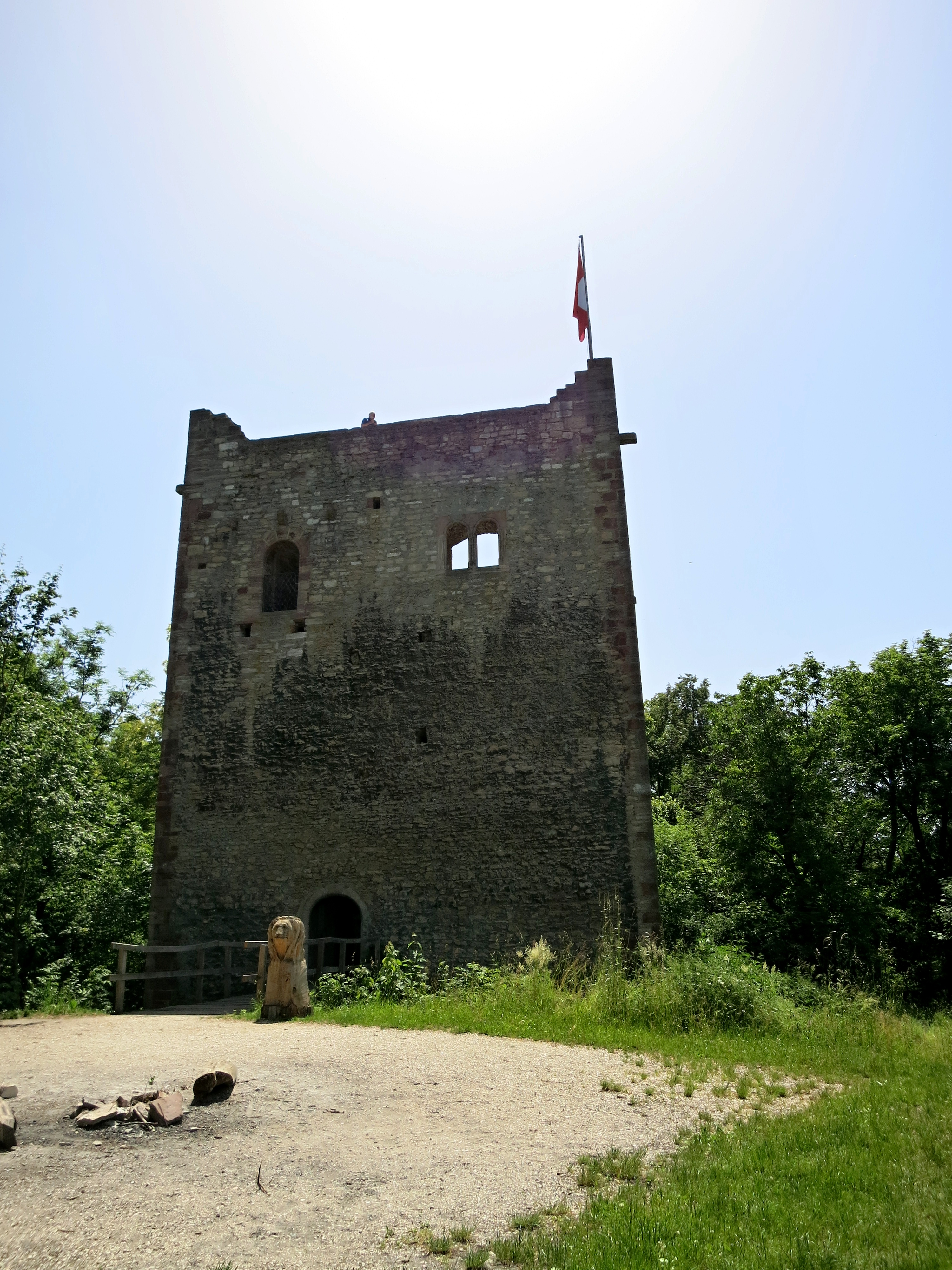 Mittlere Wartenberg